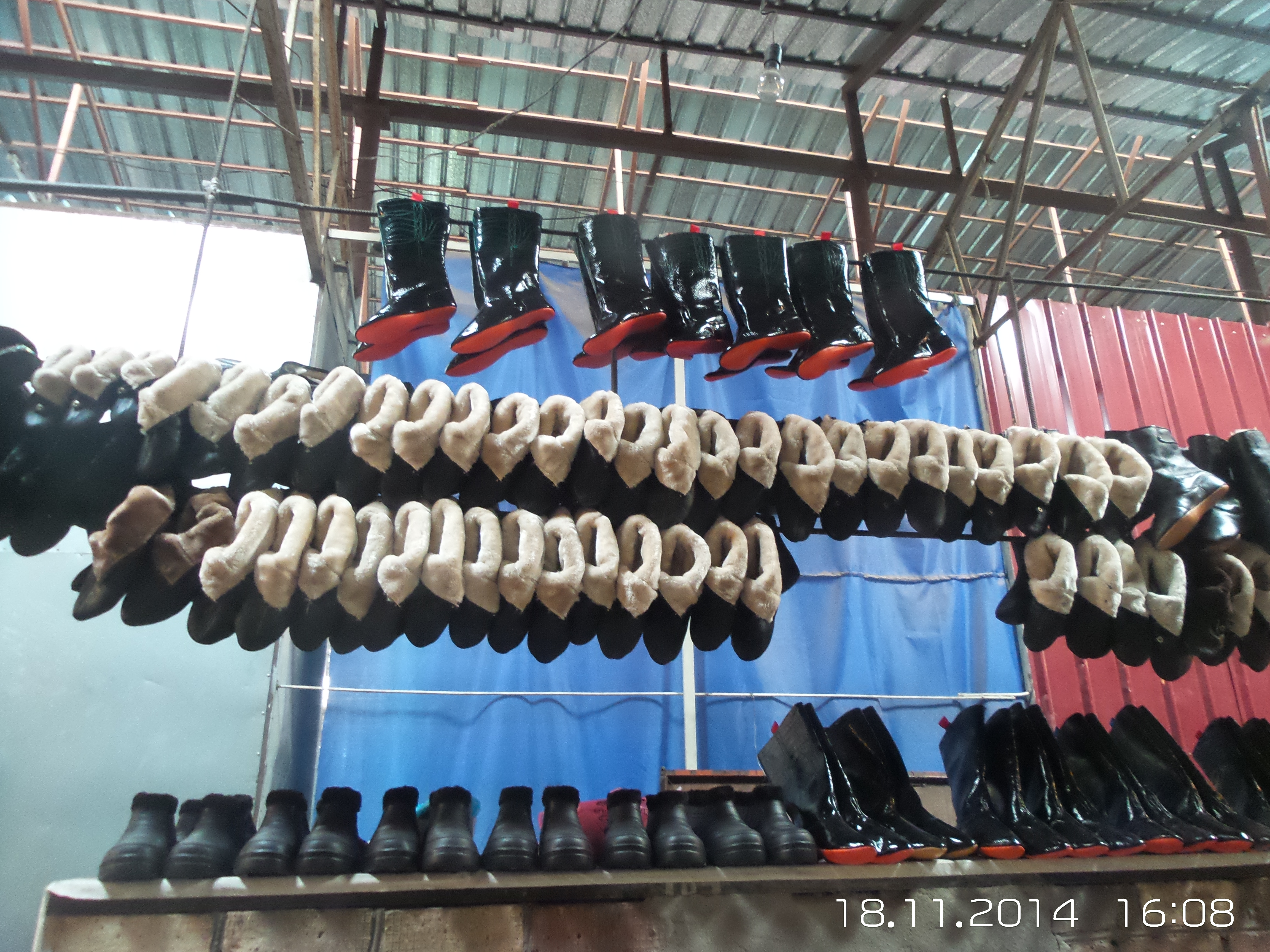 Узбекский обувь